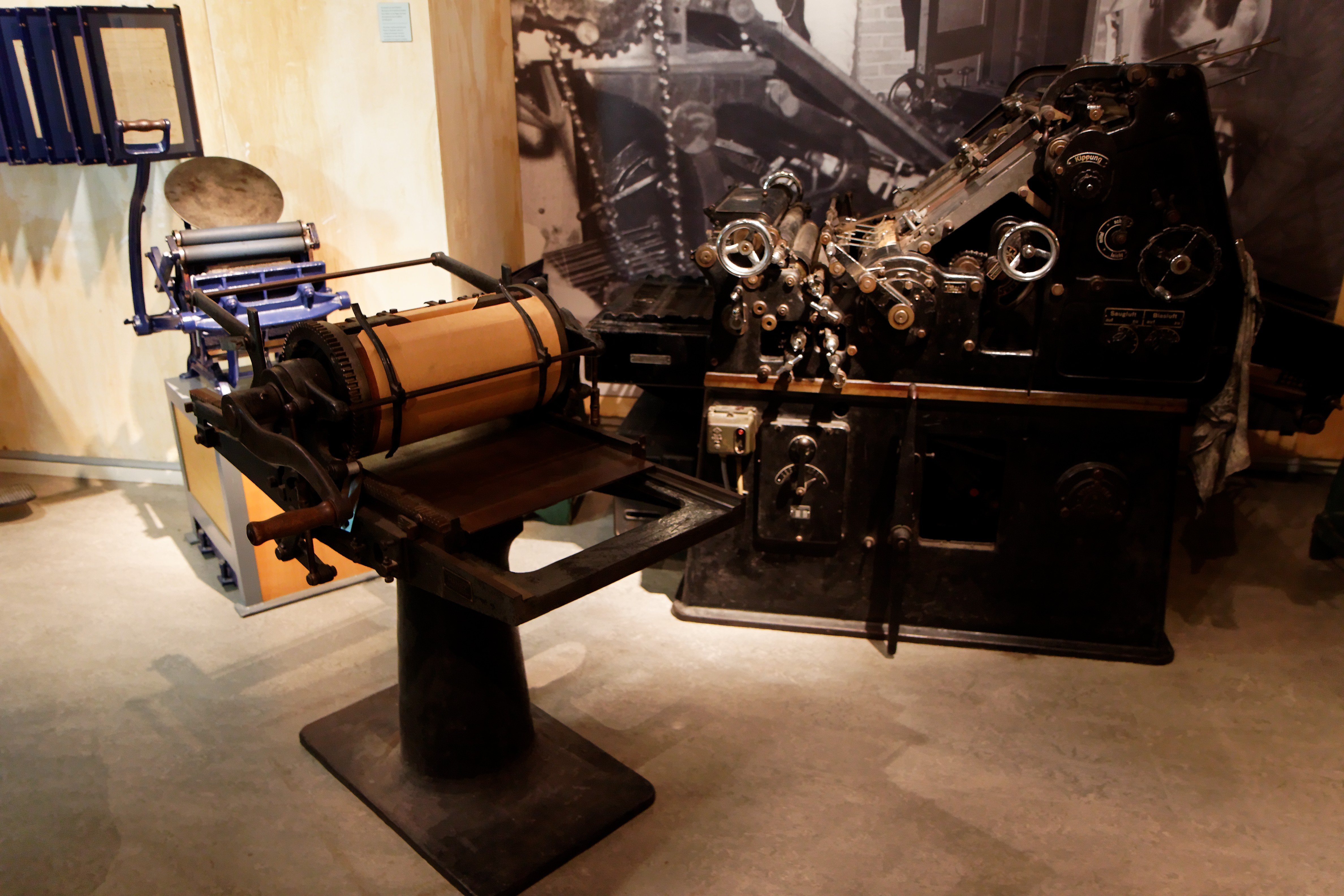 090626-121217_ 1747_50D_raw